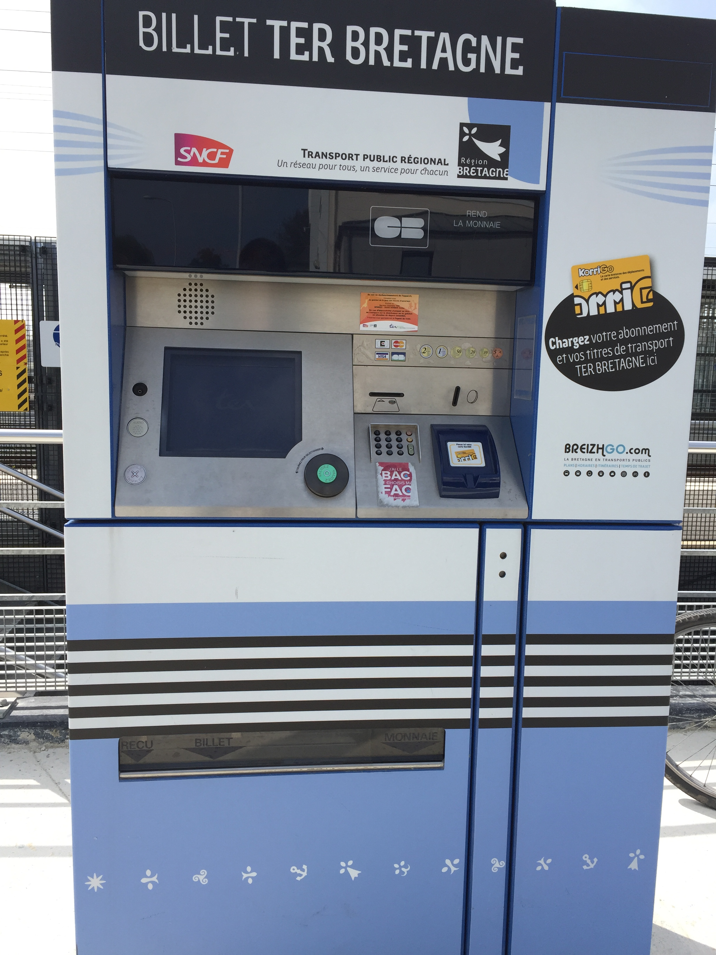 Présent à la Gare de REDON